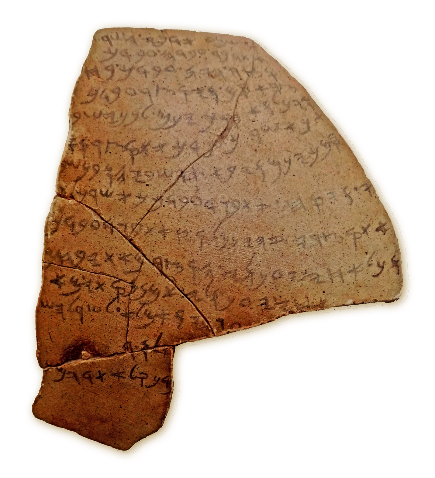 Archaeological Museum Beit Miriam in kibutz Palmahim, Israel מוזיאון בית מרים - הים ומלואו" הוא מוזיאון לארכאולוגיה השוכן בקיבוץ פלמחים מעל מצוק הצופה לים. המוזיאון מתרכז בממצאים ארכאולוגים שנחפרו באזור הקרוב לפלמחים, בחלקו התחתון של ערוץ נחל שורק וממצאים שנמשו מהים בקרבת הקיבוץ. האוסטיקון ממצד חשביהו